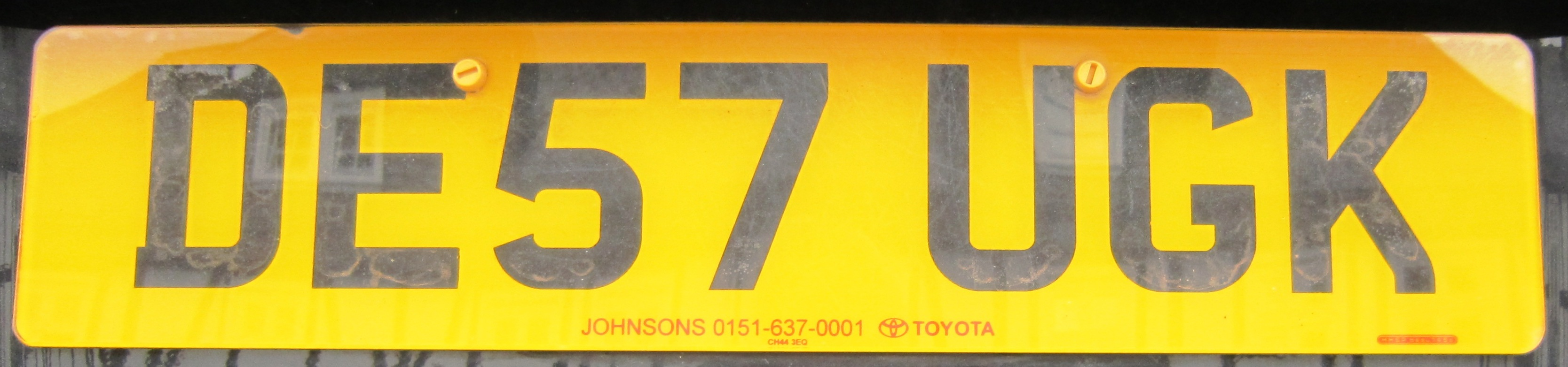 UK kentekenplaat achter